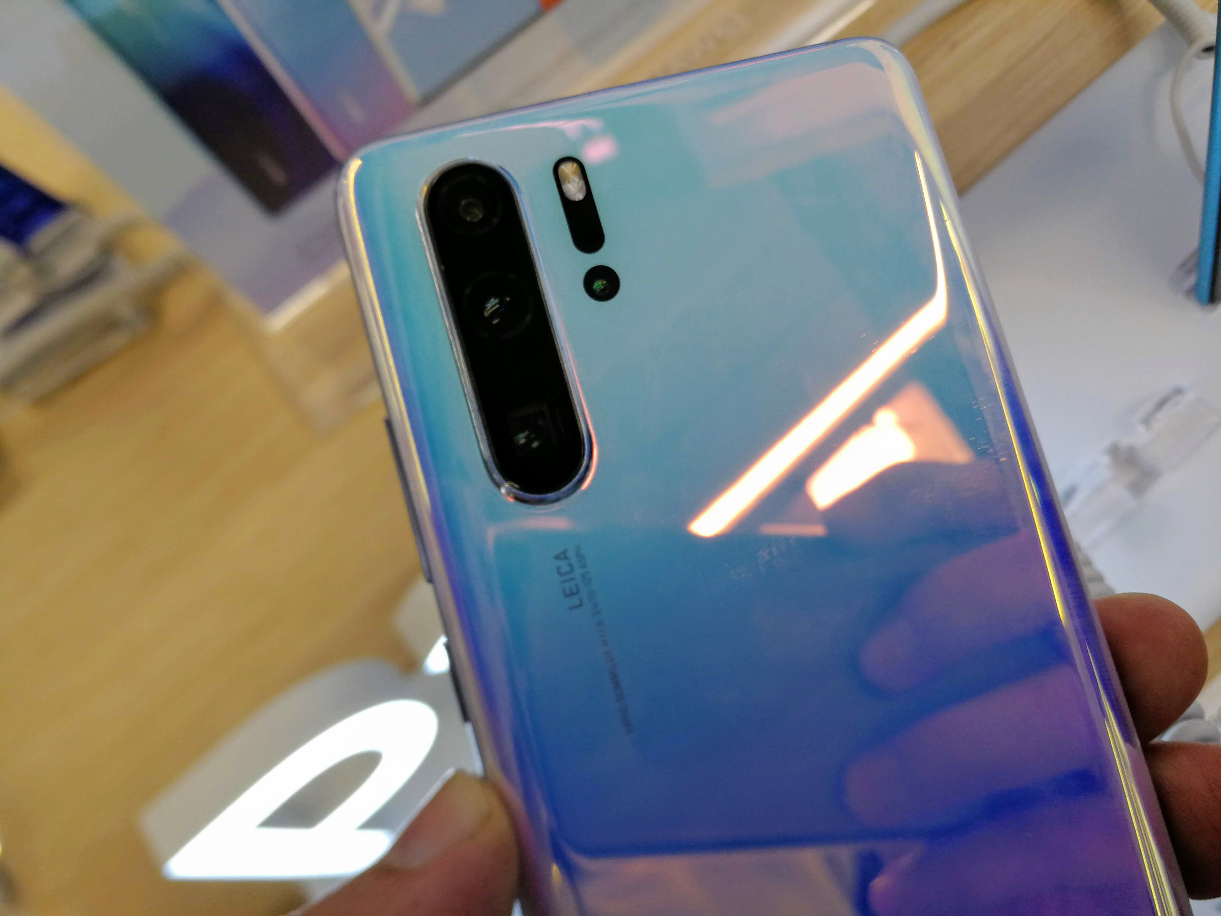 Auf der Rückseite des Huawei P30 Pro sind die 4 Kameras sowie der LED Blitz zu sehen. Die Farbe des im Foto gezeigten Modells ist Breathing Crystal.